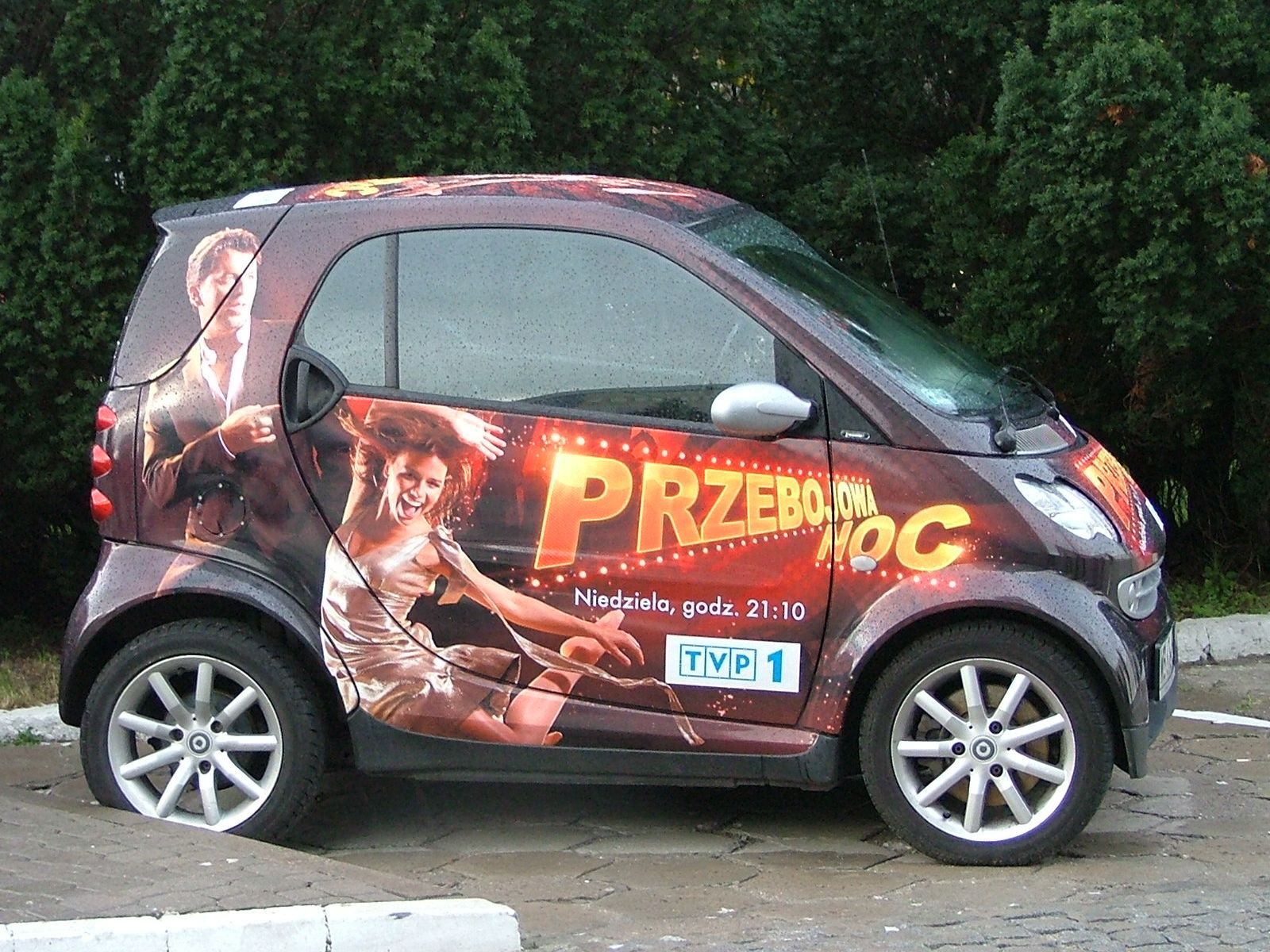 Poland, Warsaw, TVP, Dzień Otwarty Telewizji Polskiej, 9 września 2007, samochód reklamujący program TVP 1 pt. Przebojowa noc